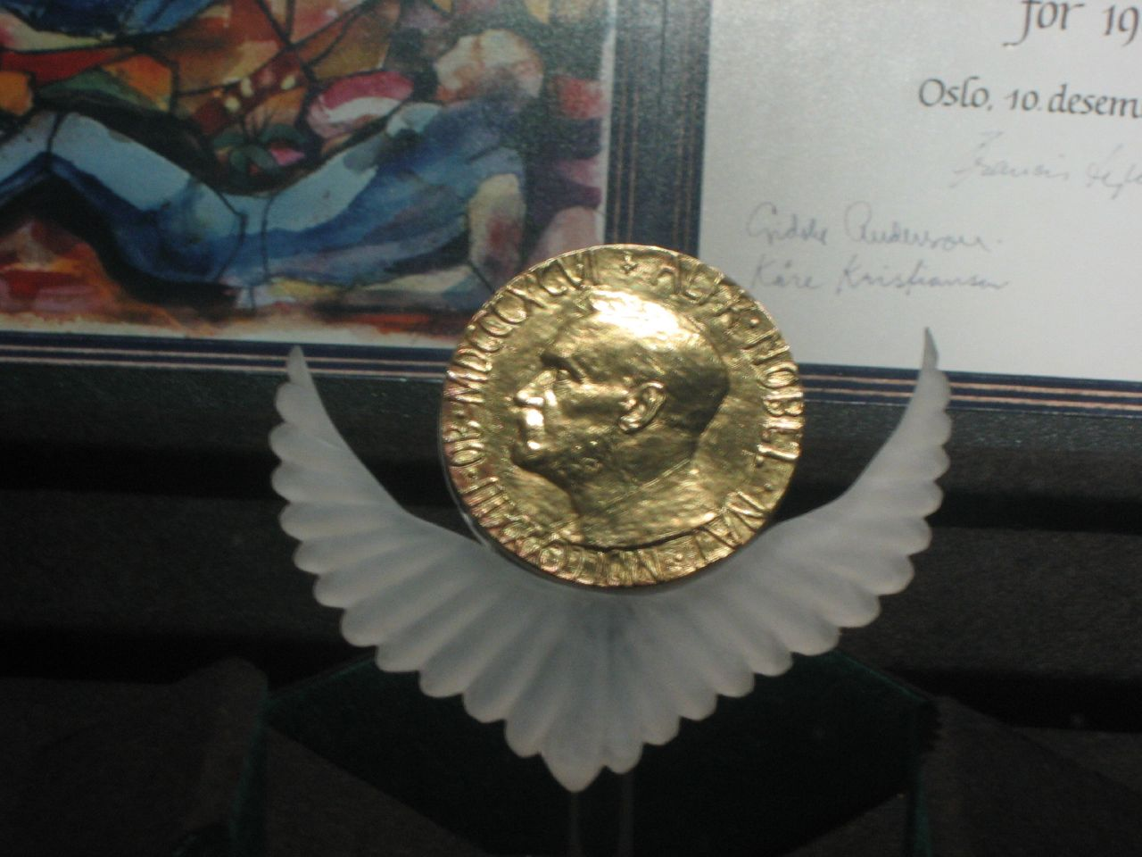 Rigoberta Menchu's Nobel Prize